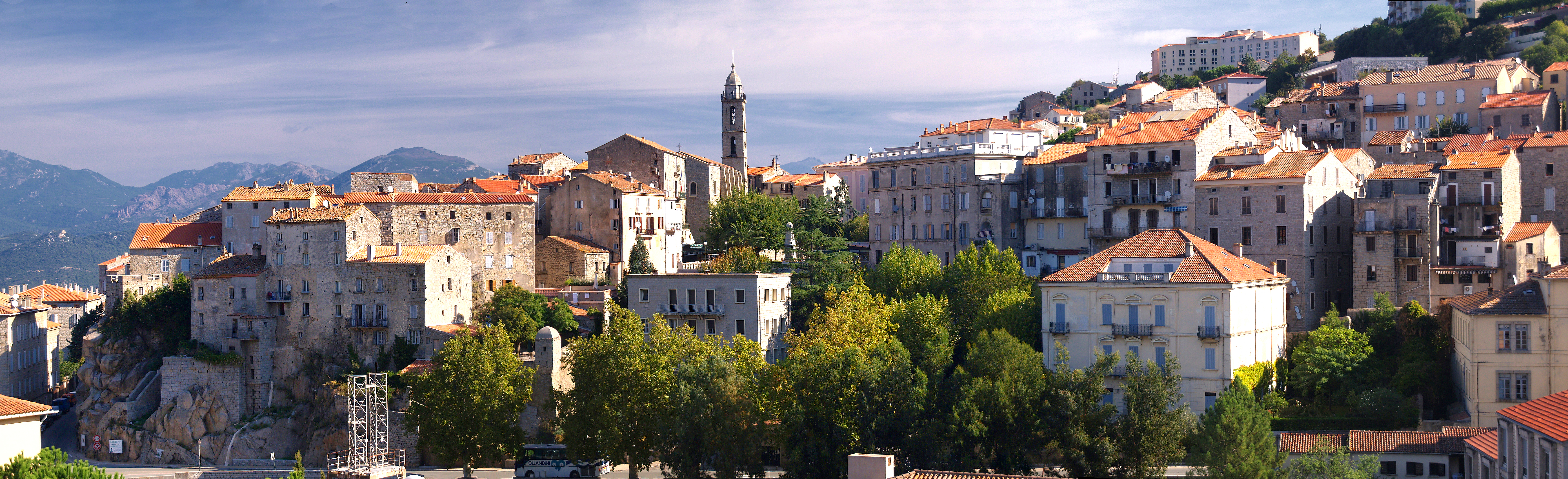 Sartene - Panorama sur la ville